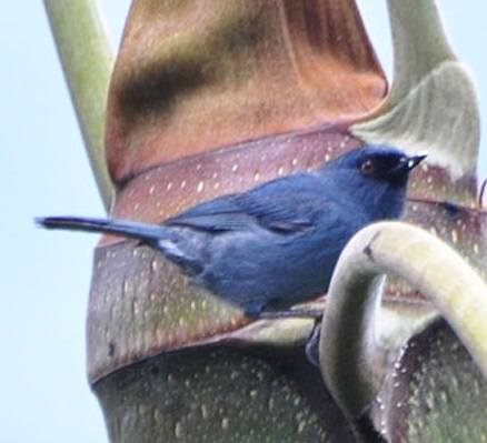 Diglossa caerulescens en Ecuador.